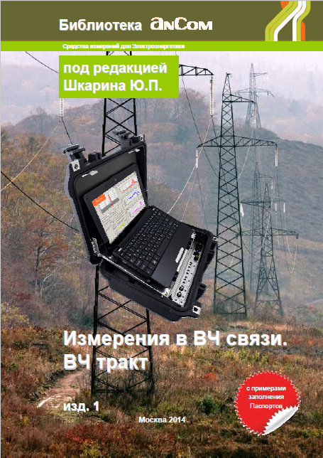 Серия брошюр "Измерения в ВЧ связи" с описанием теории и методики измерений параметров устройств обработки и присоединения, ВЧ трактов, ВЧ каналов и аппаратуры. Под редакцией Шкарина Ю.П.